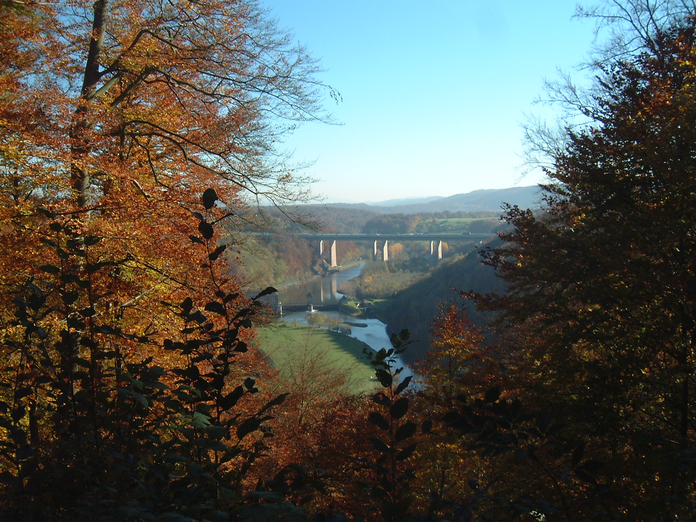 Naturpark Münden, Blick ins Werratal mit dem Laufwasserkraftwerk Werrawerk (früher Letzter Heller) und den Werratalbrücken der A 7 und ICE-Strecke